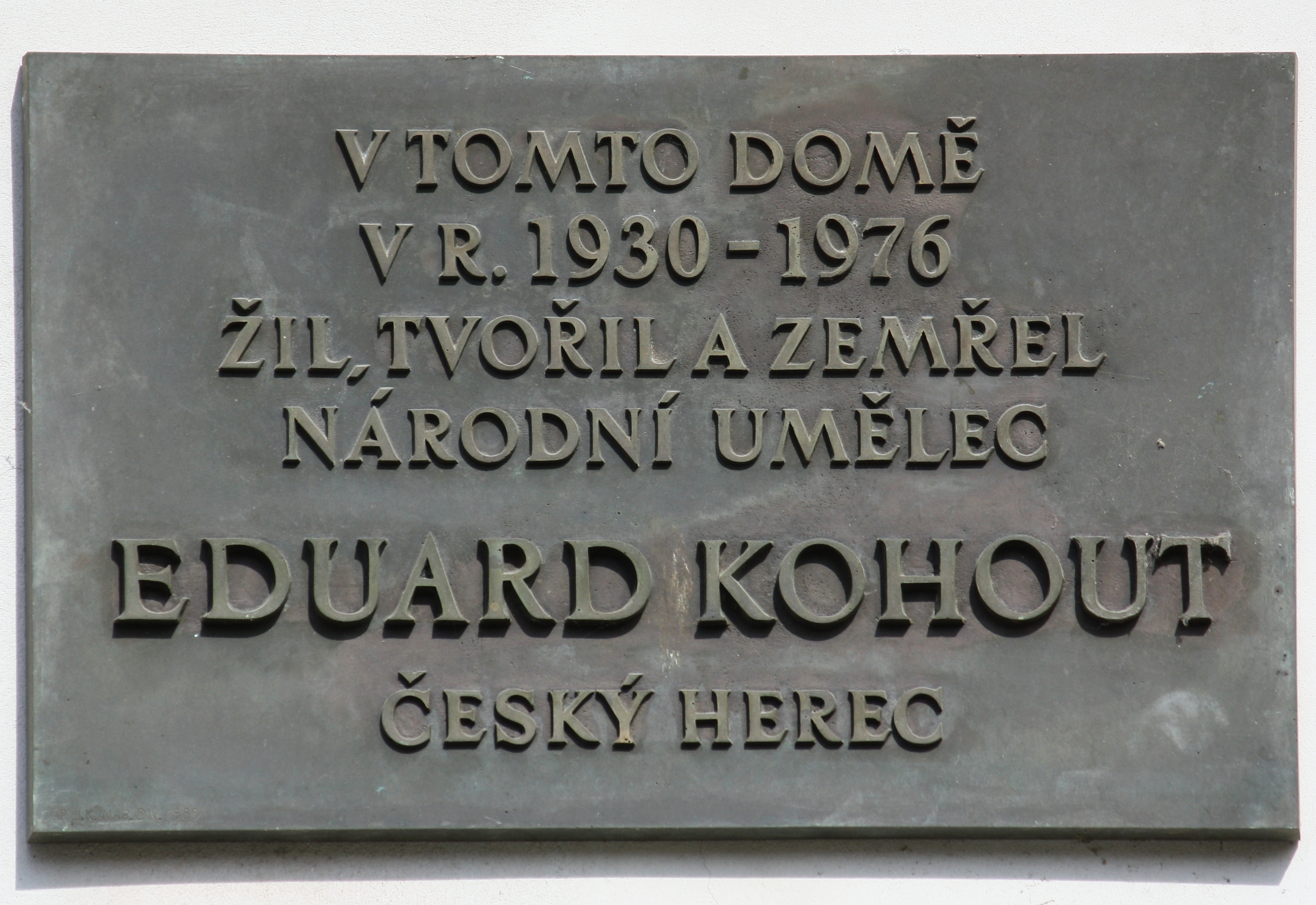 Praha, Malá Strana - Na Kampě 512/11 (Eduard Kohout)